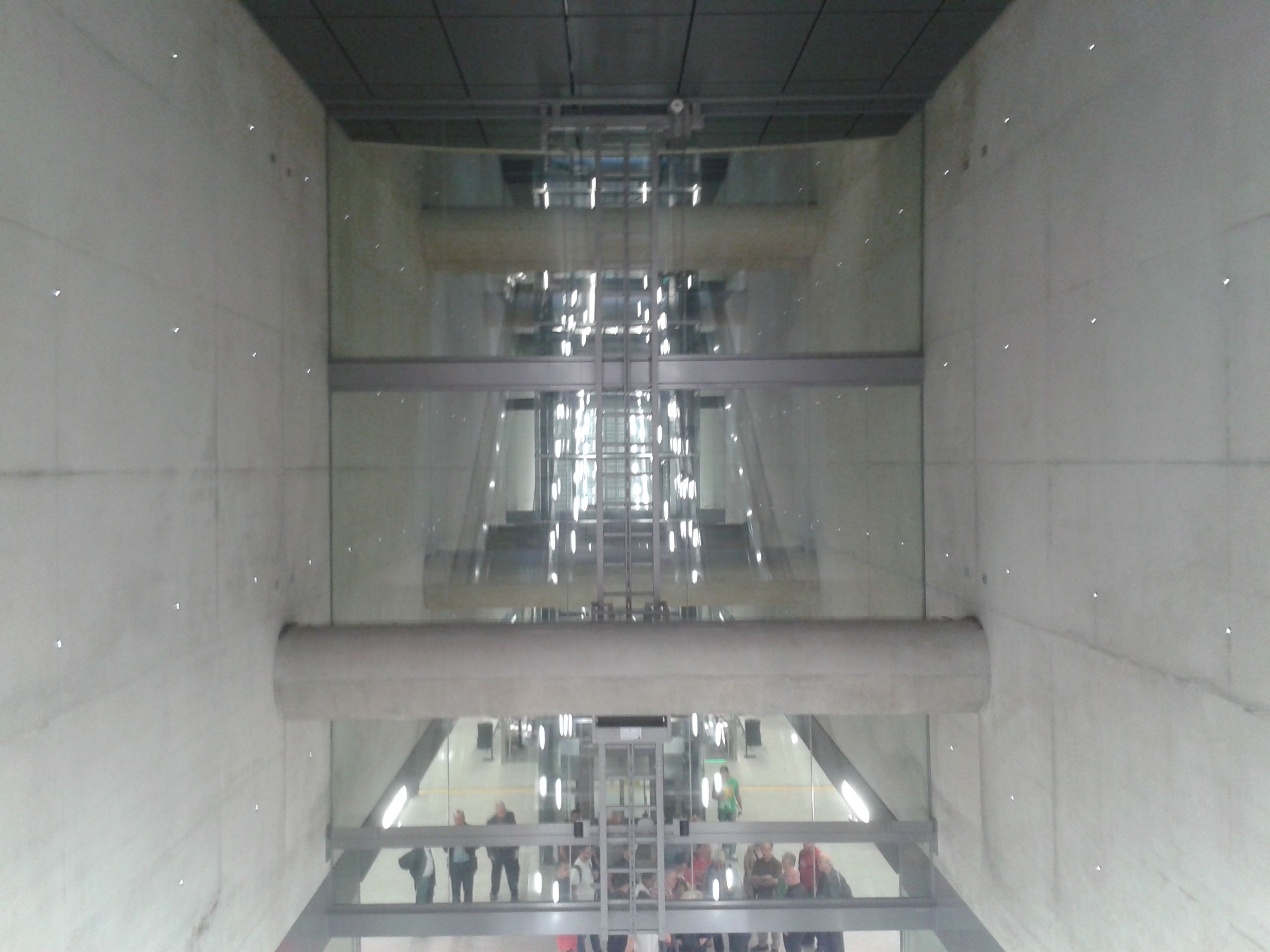 Blick von der Treppe des Kölner U-Bahnhof Chlodwigplatz